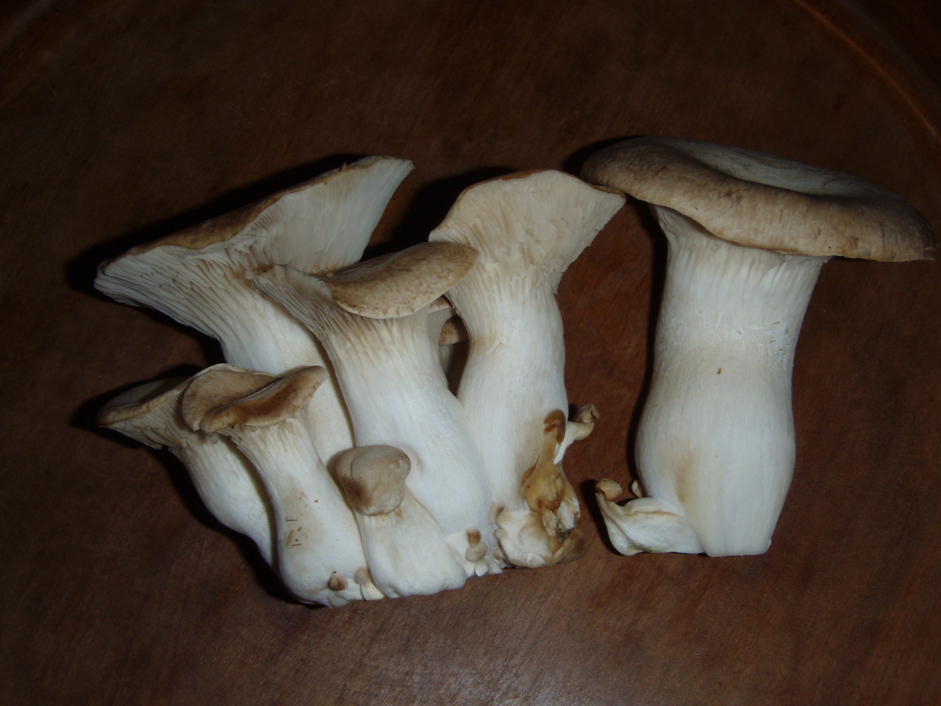 エリンギの菌床栽培品(Nagano prf. Japan)